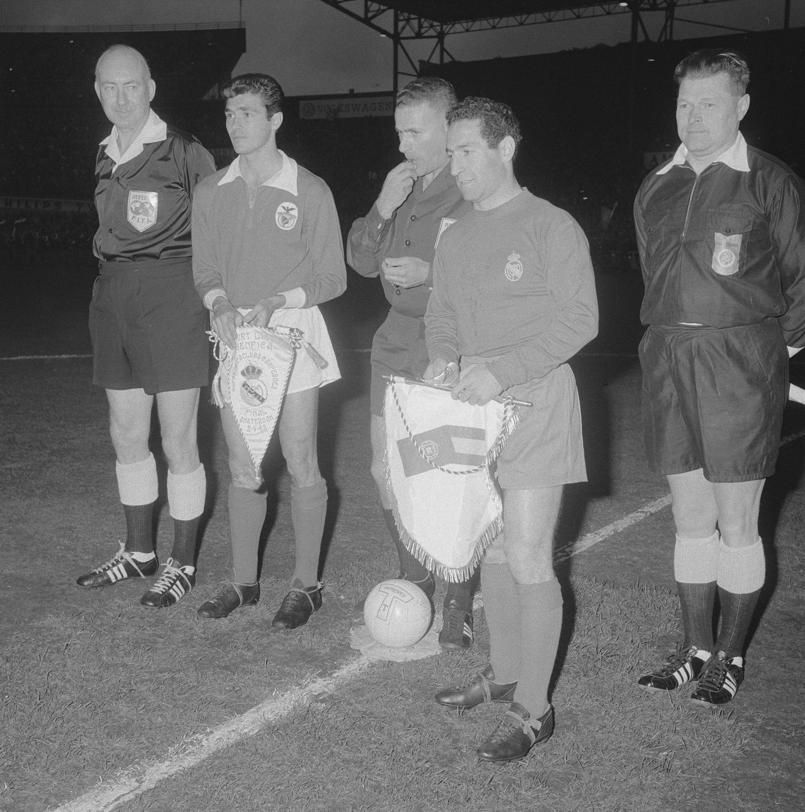 Collectie / Archief : Fotocollectie Anefo Reportage / Serie : [ onbekend ] Beschrijving : Beufica tegen Real Madrid 5-3 spelers van Benfica Datum : 2 mei 1962 Trefwoorden : SPELERS, sport, voetbal Instellingsnaam : Real Madrid Fotograaf : Nijs, Jac. de / Anefo Auteursrechthebbende : Nationaal Archief Materiaalsoort : Negatief (zwart/wit) Nummer archiefinventaris : bekijk toegang 2.24.01.03 Bestanddeelnummer : 913-8531